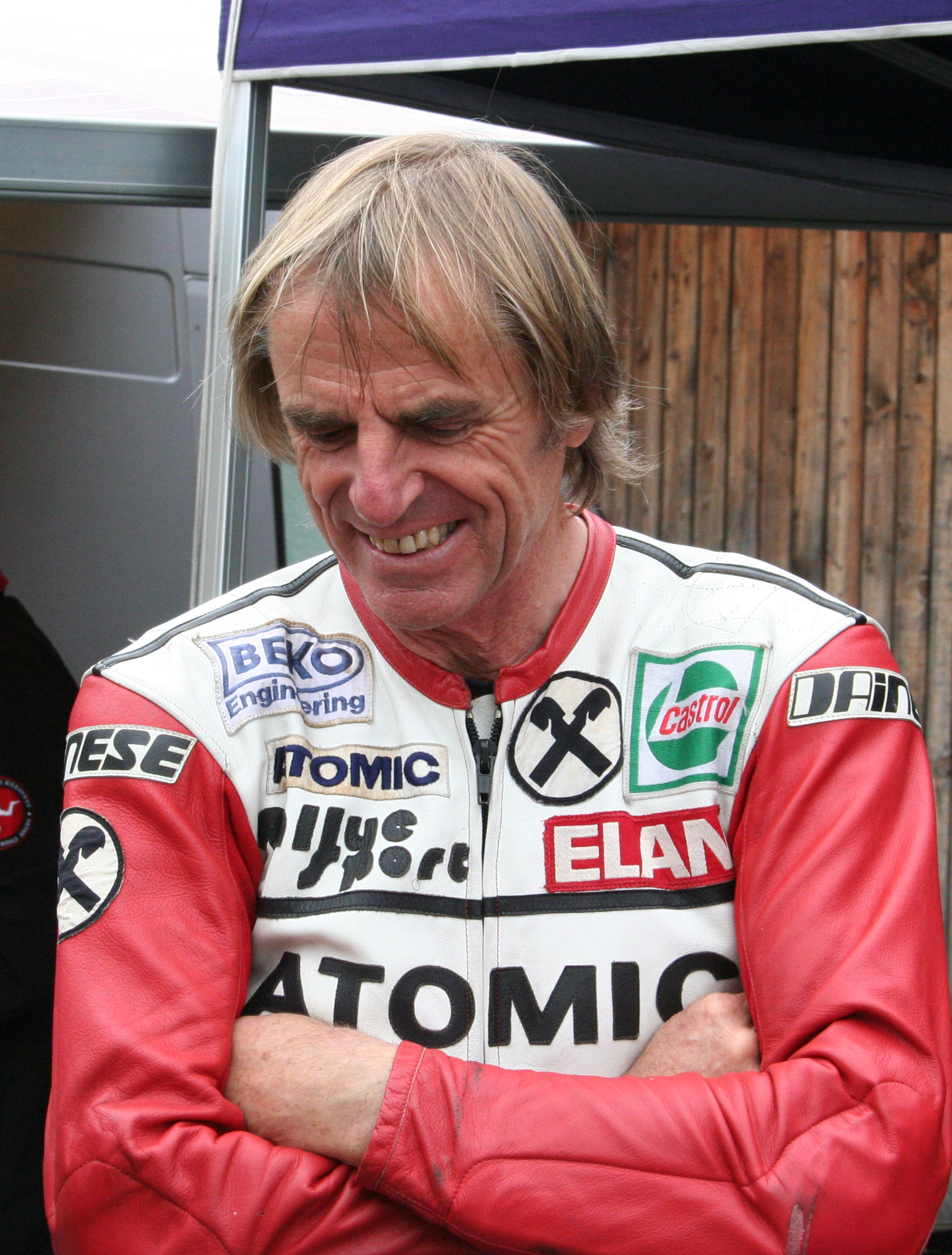 August "Gustl" Auinger beim Oldtimer Grand Prix 2016 in Schwanenstadt, Österreich